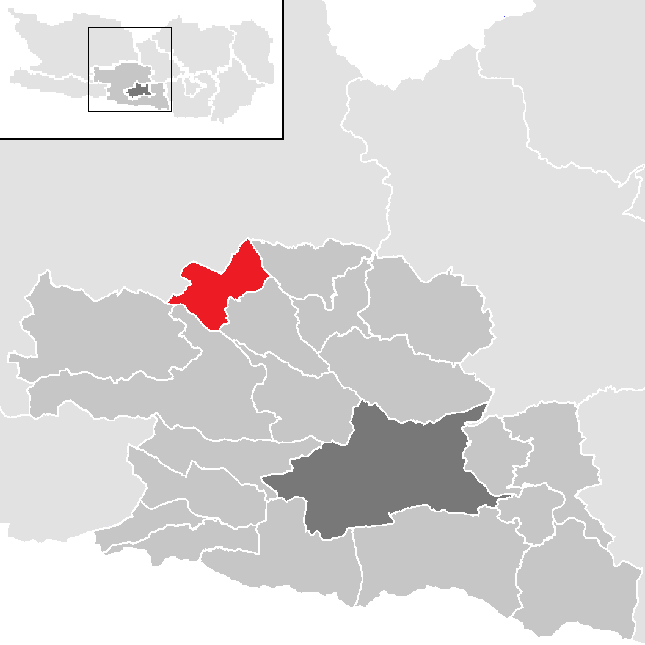 Bezirk Villach-Land